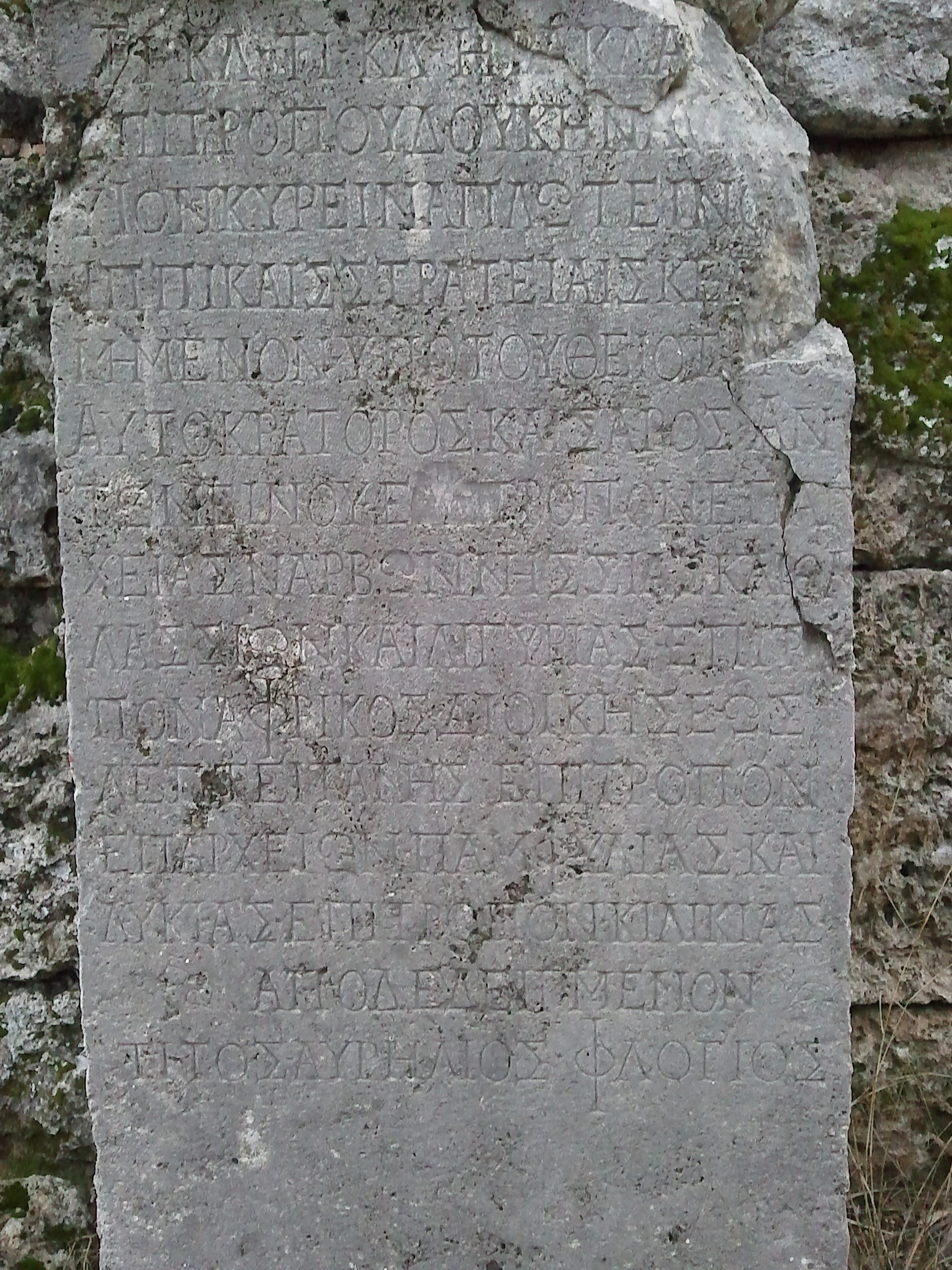 Perge'de bulunan yazıtlar.